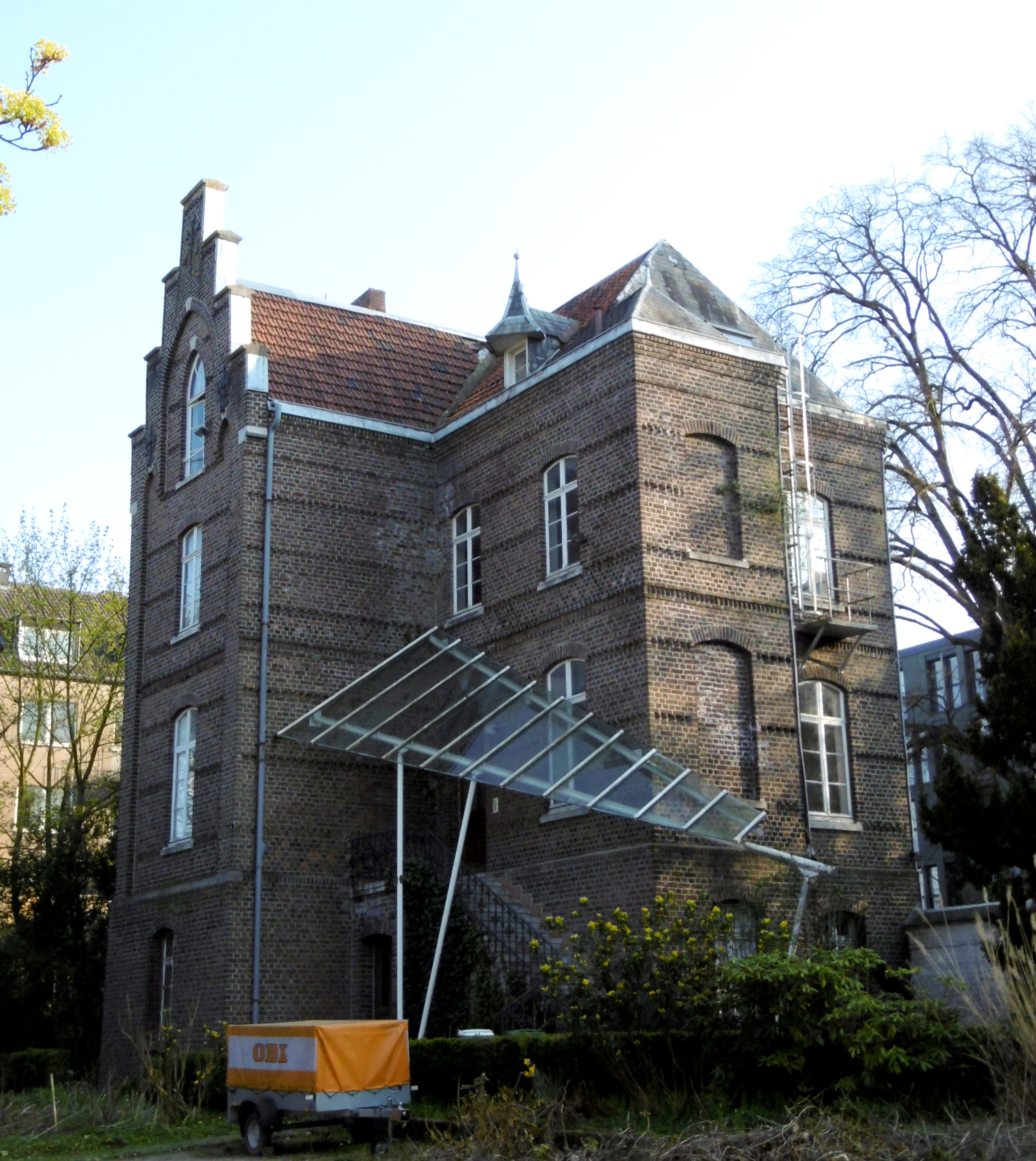 Priesterhaus des Klosters zum Guten Hirten in Aachen-Süsterfeld, Baudenkmal